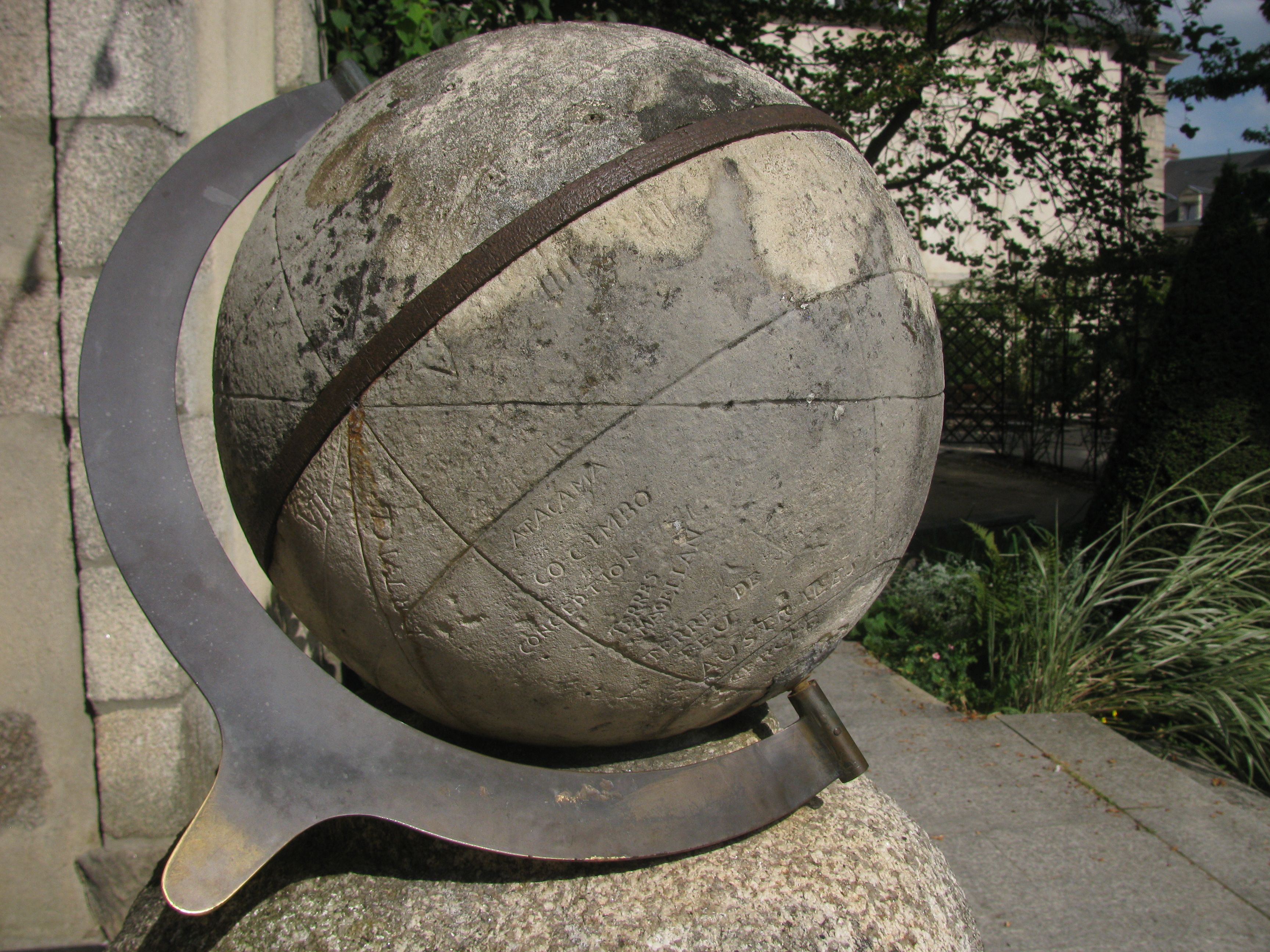 Détail du cadran solaire (XVIIe siècle) à l'entrée de l'ancienne église du collège des Jésuites (aujourd'hui bibliothèque municipale d'Alençon) provenant de l'ancienne abbaye du Val-Dieu. .